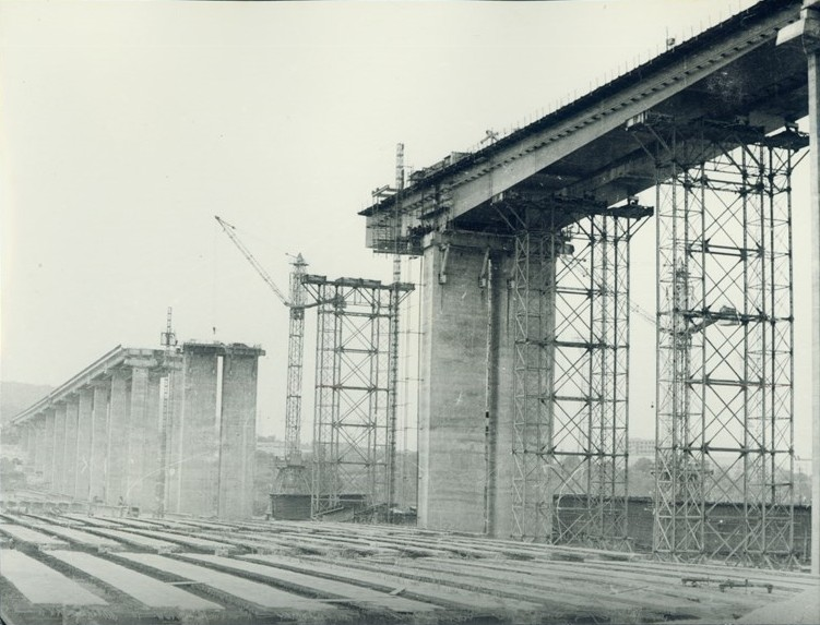 Построяването на Аспарухов мост, над канала, свързващ Черно море и Варненското езеро.